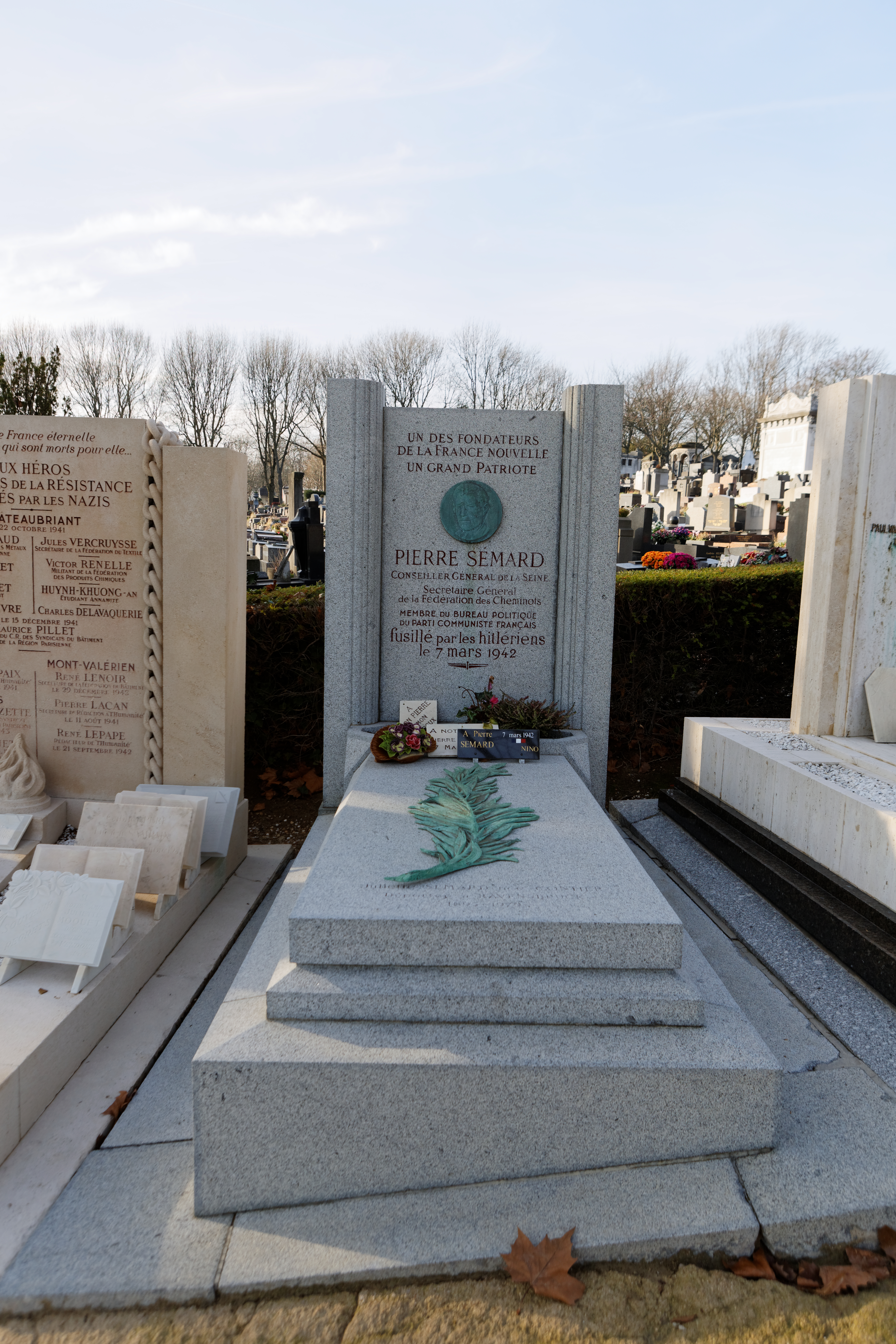 Sépulture de Pierre Semard, syndicaliste, secrétaire général de la Fédération des cheminots et dirigeant du PCF, dont il fut secrétaire général de 1924 à 1929, fusillé par les Allemands à la prison d'Évreux. Monument ornée d'une palme et d'un médaillon en bronze, non signé, représentant Pierre Semard.